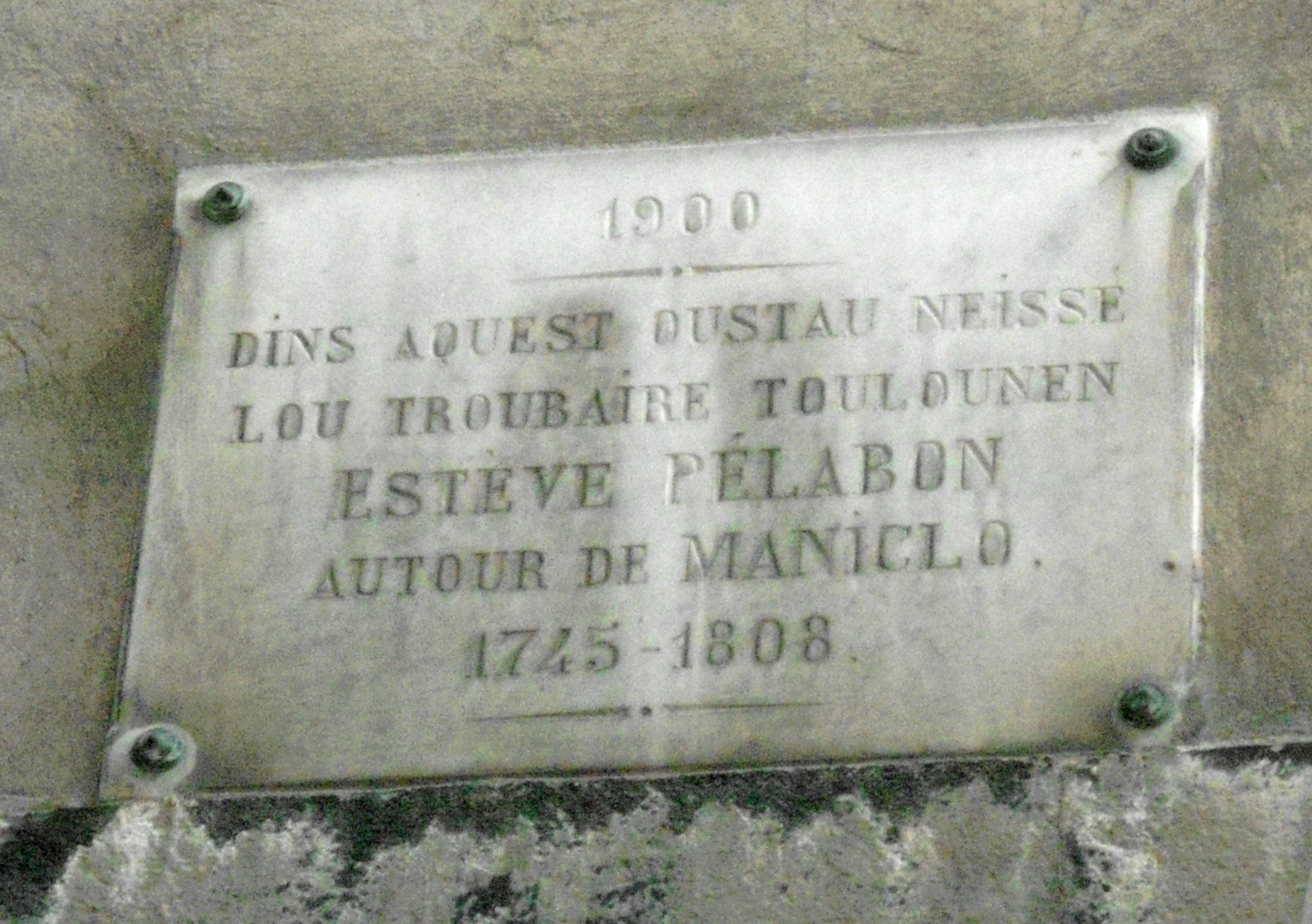 Runa Simi: Pelabonpa wasin Tolonpi quellqarka